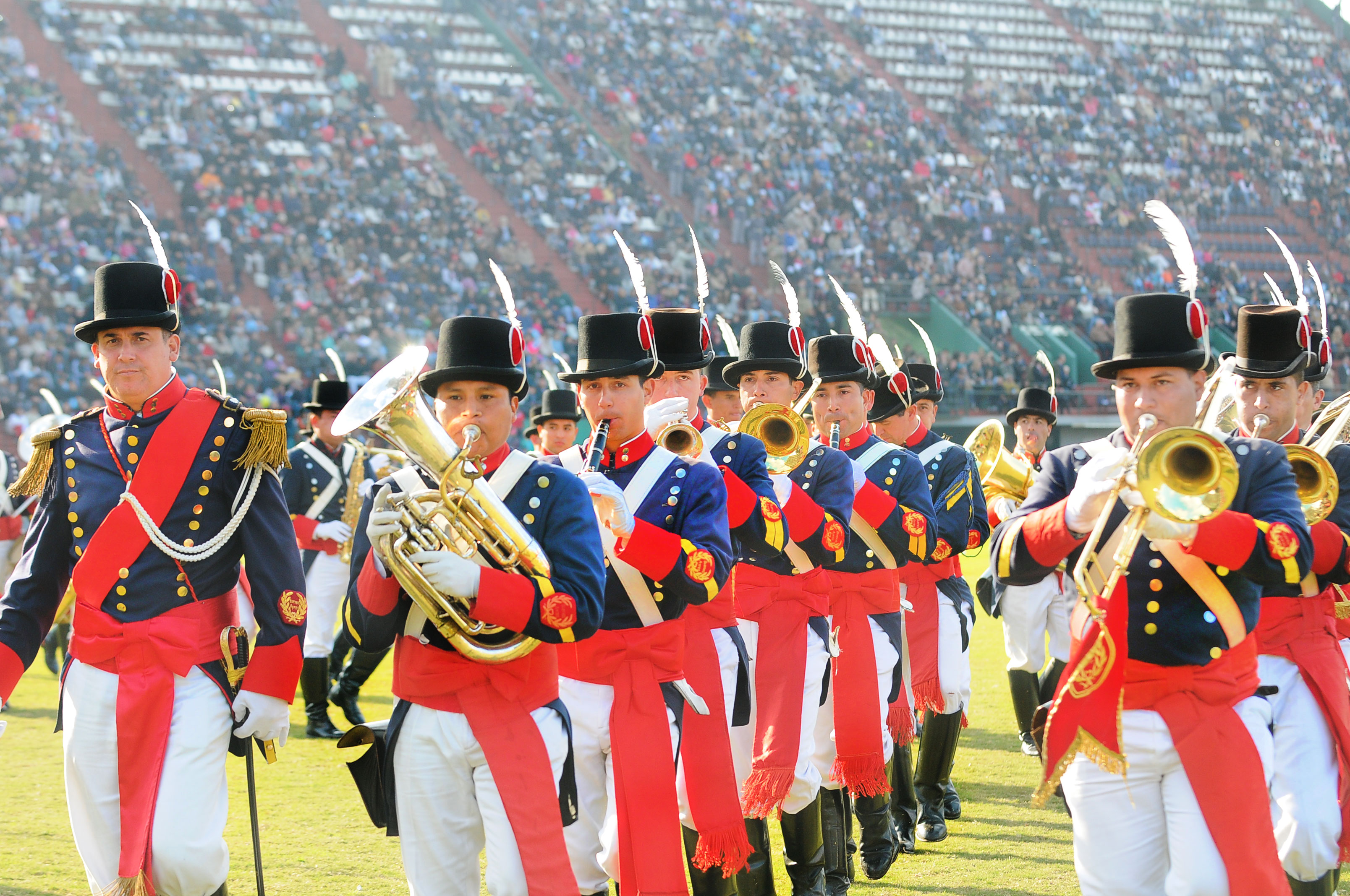 Banda Militar del Regimiento de Infantería de Patricios.